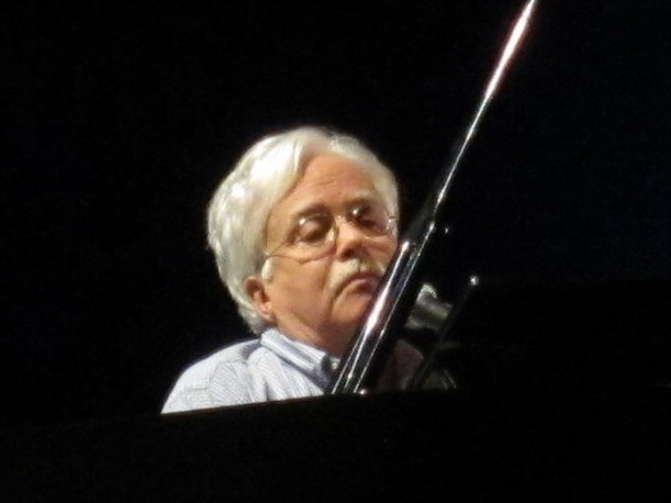 Primavera Sound 2010 Parc del Fòrum Barcelona